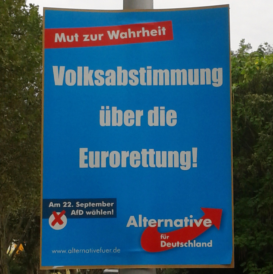 Eine Information zur Bundestagswahl 2013 von der AFD